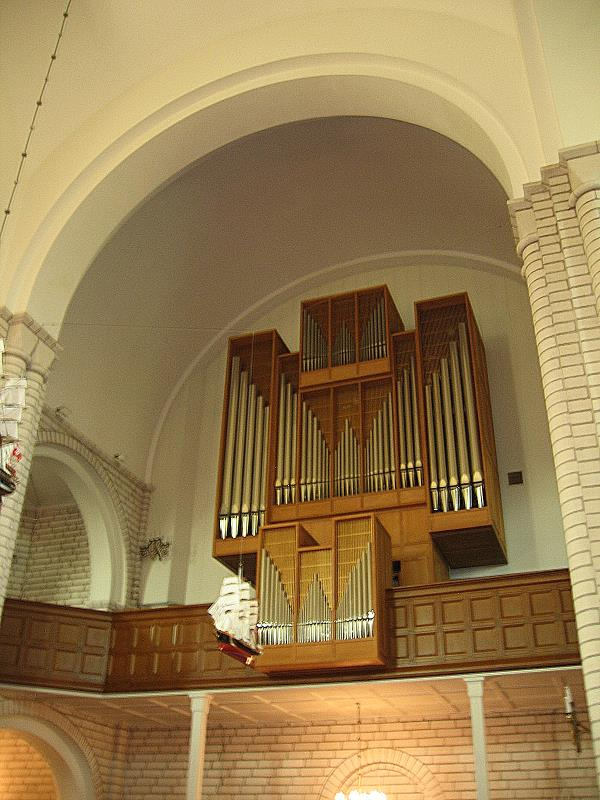 Organ, Frederikshavn Kirke, Aalborg Stift